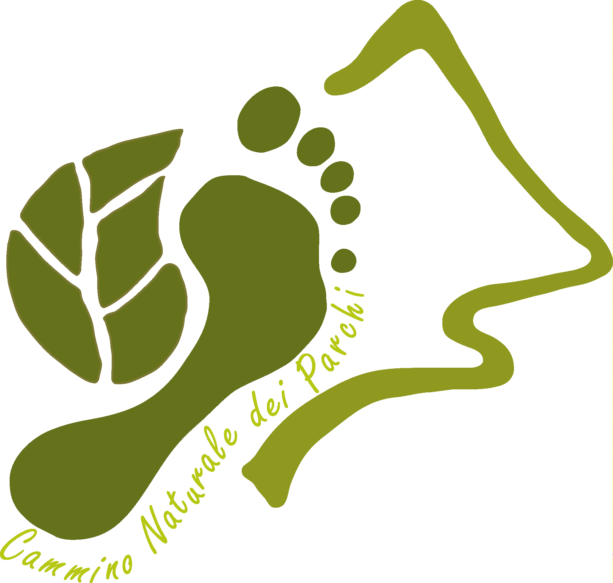 Un prototipo del logo del Cammino Naturale dei Parchi in ideazione